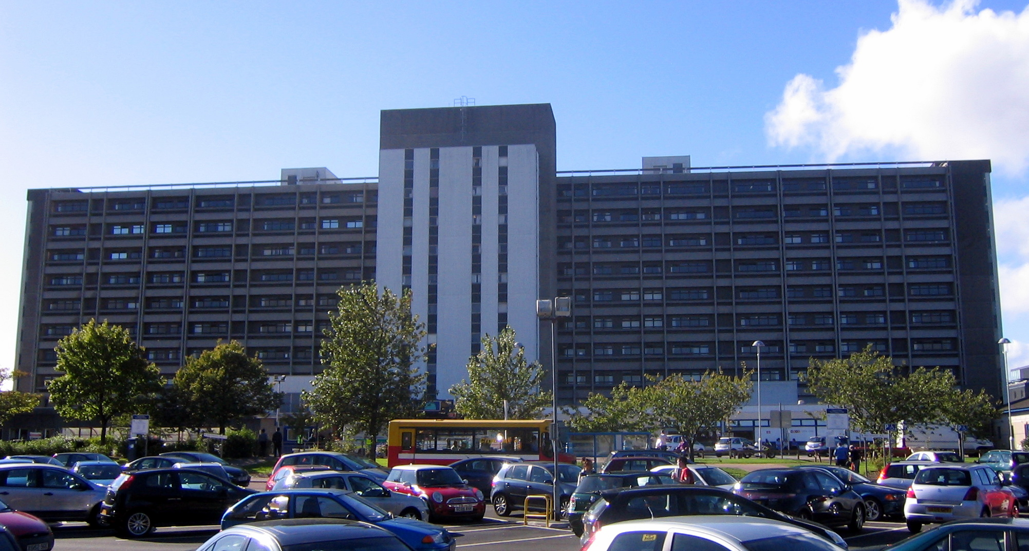 Wikipedia:Gartnavel General Hospital in Glasgow.Gartnavel General Hospital